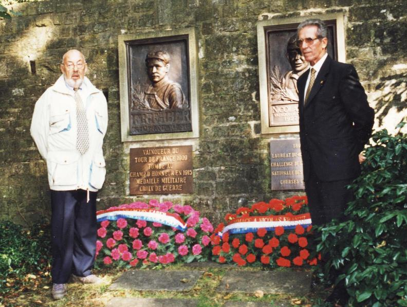 Charly Gaul (1932-2005) et Federico Bahamontes (*1928) en 1998 devant le mémorial des cyclistes François Faber (1887-1915) et Nicolas Frantz (1899-1985) au parc de la ville de Luxembourg